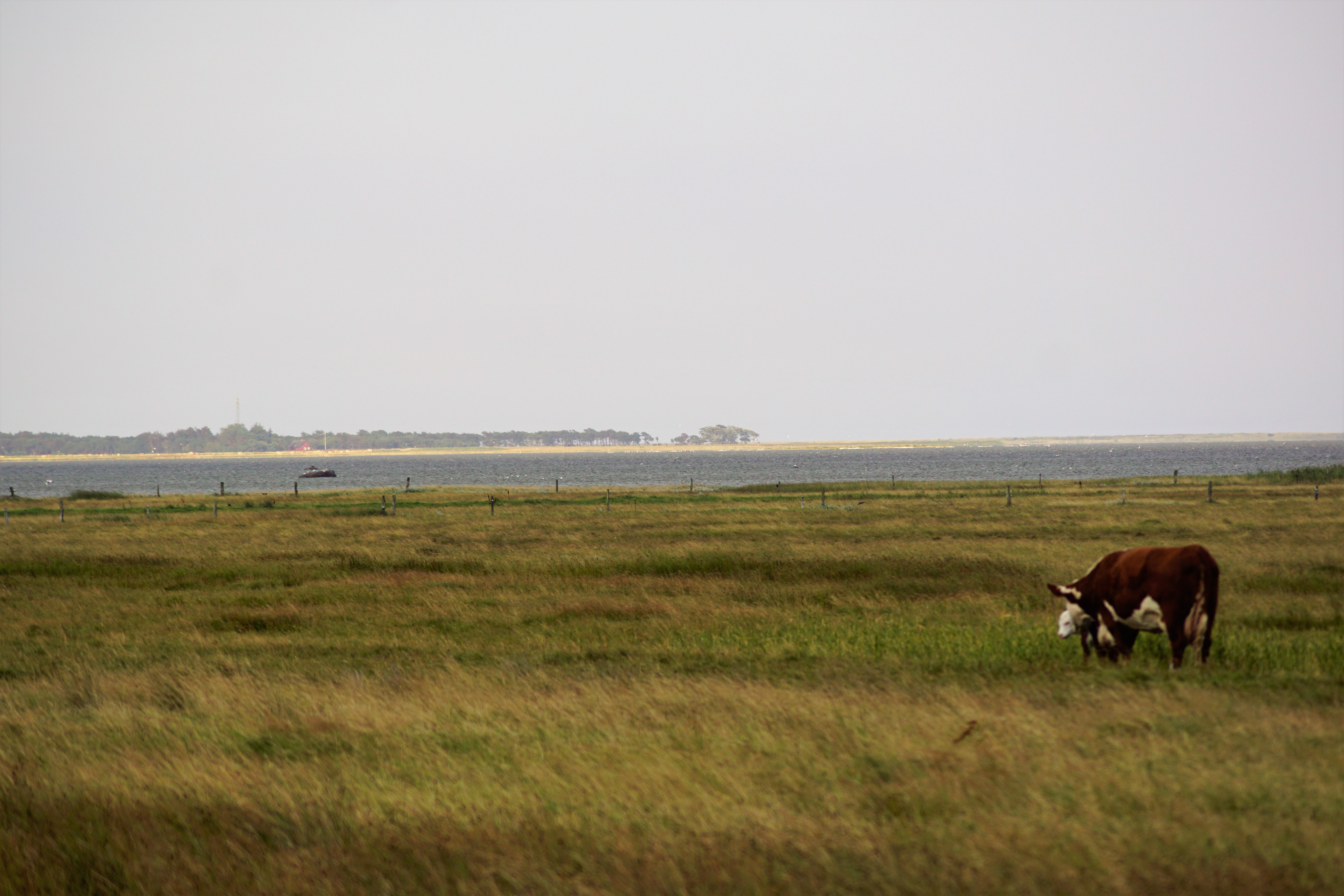 Bovet Bugt med Bløden Hale i baggrunden